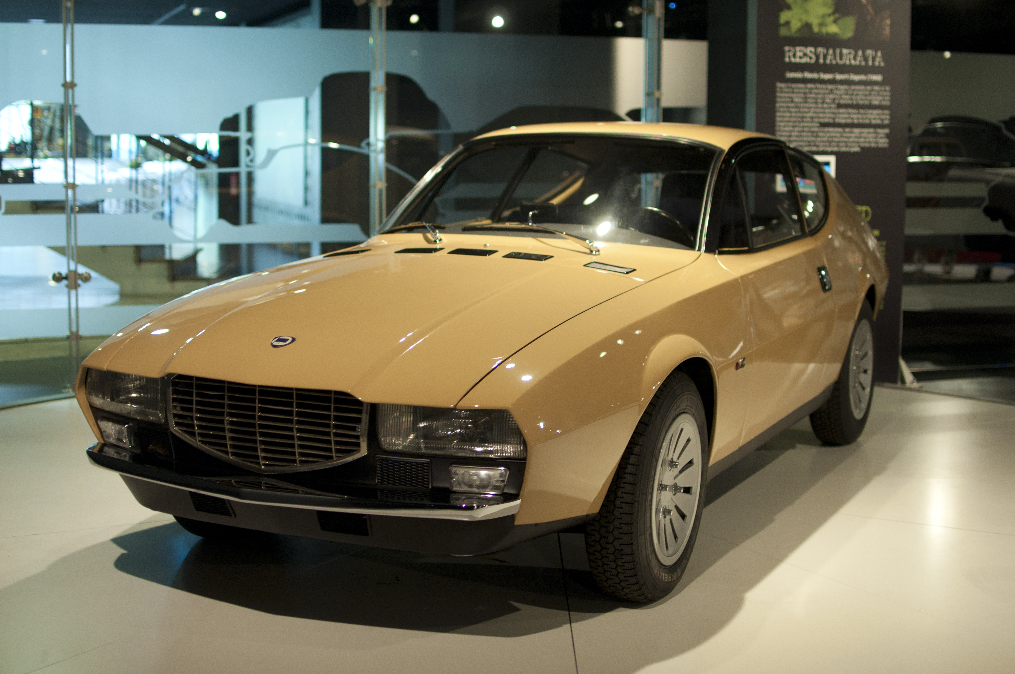 Lancia Flavia Super Sport by Zagato, Museo Nazionale dell'Automobile di Torino.